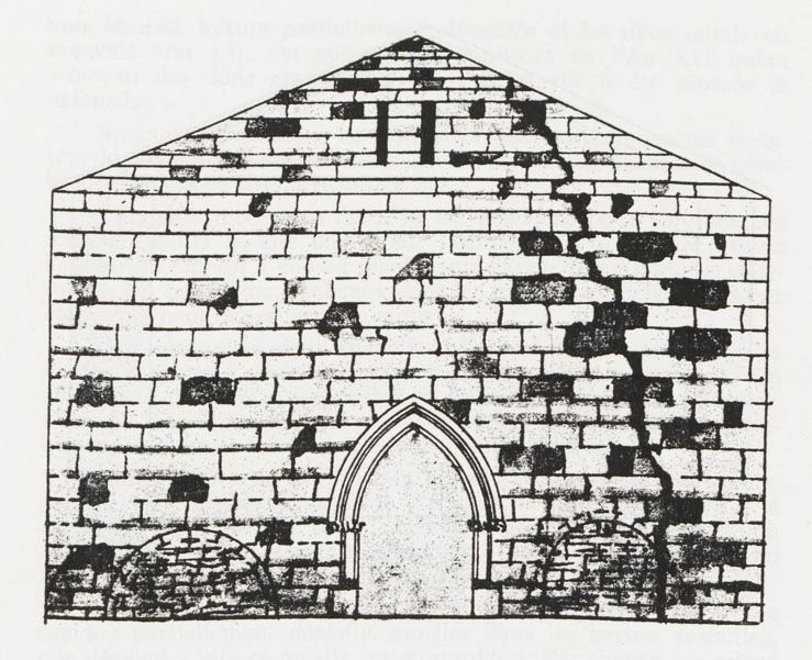 Saint-Clar, Gers, Occitanie, France : ancienne église Sainte-Catherine, plans relevés au milueu du XIXe siècle par l’entrepreneur Bourrousse : façade ouest, détruite.